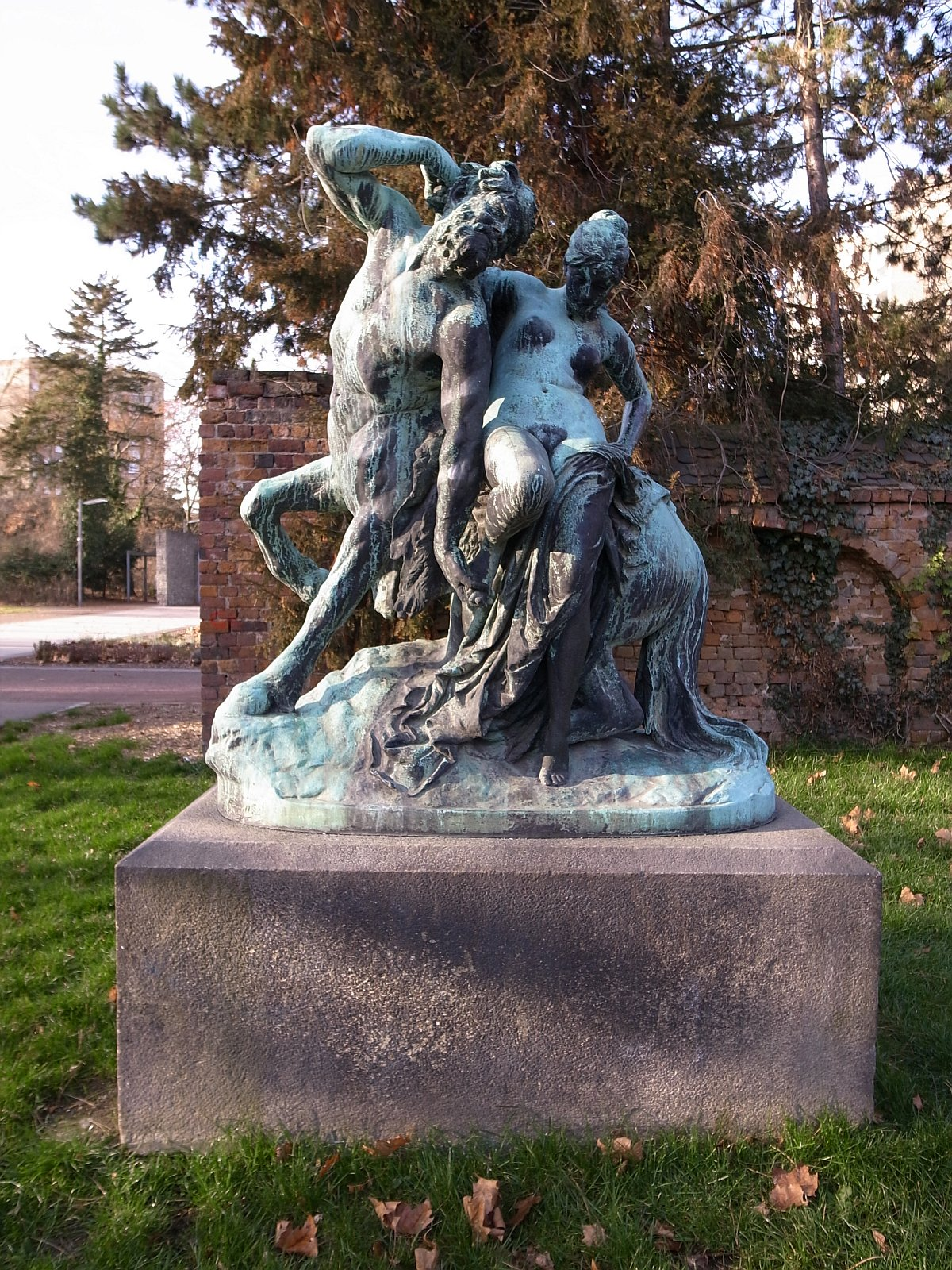 Reinhold Begas, Kentaur und Nymphe, im Stadtpark von Dessau (Bronzeplastik „Zentaur“)